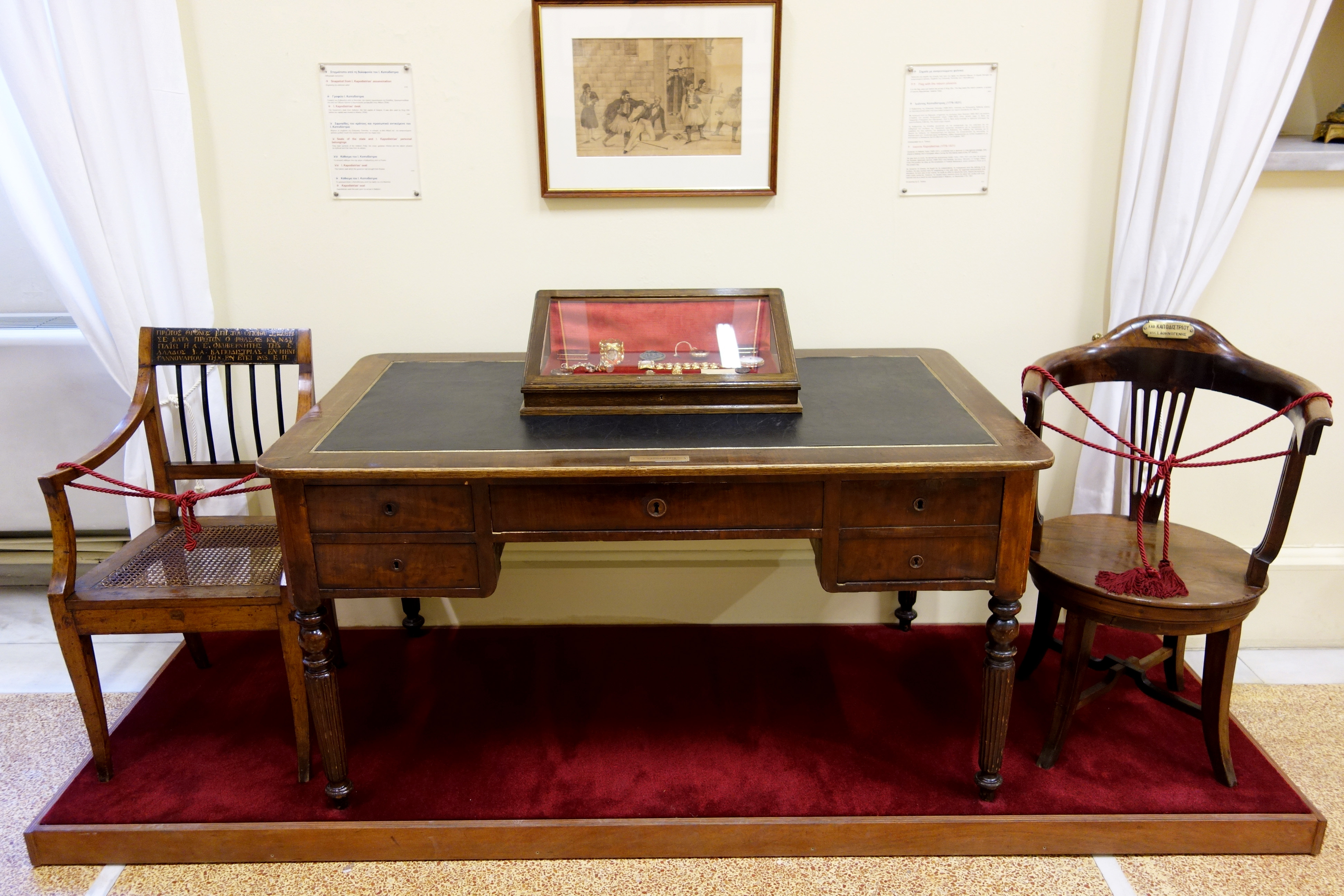 Mvskoke: Το γραφείο και το κάθισμα του Ιωάννη Καποδίστρια όπως εκτίθενται στο Εθνικό Ιστορικό Μουσείο.